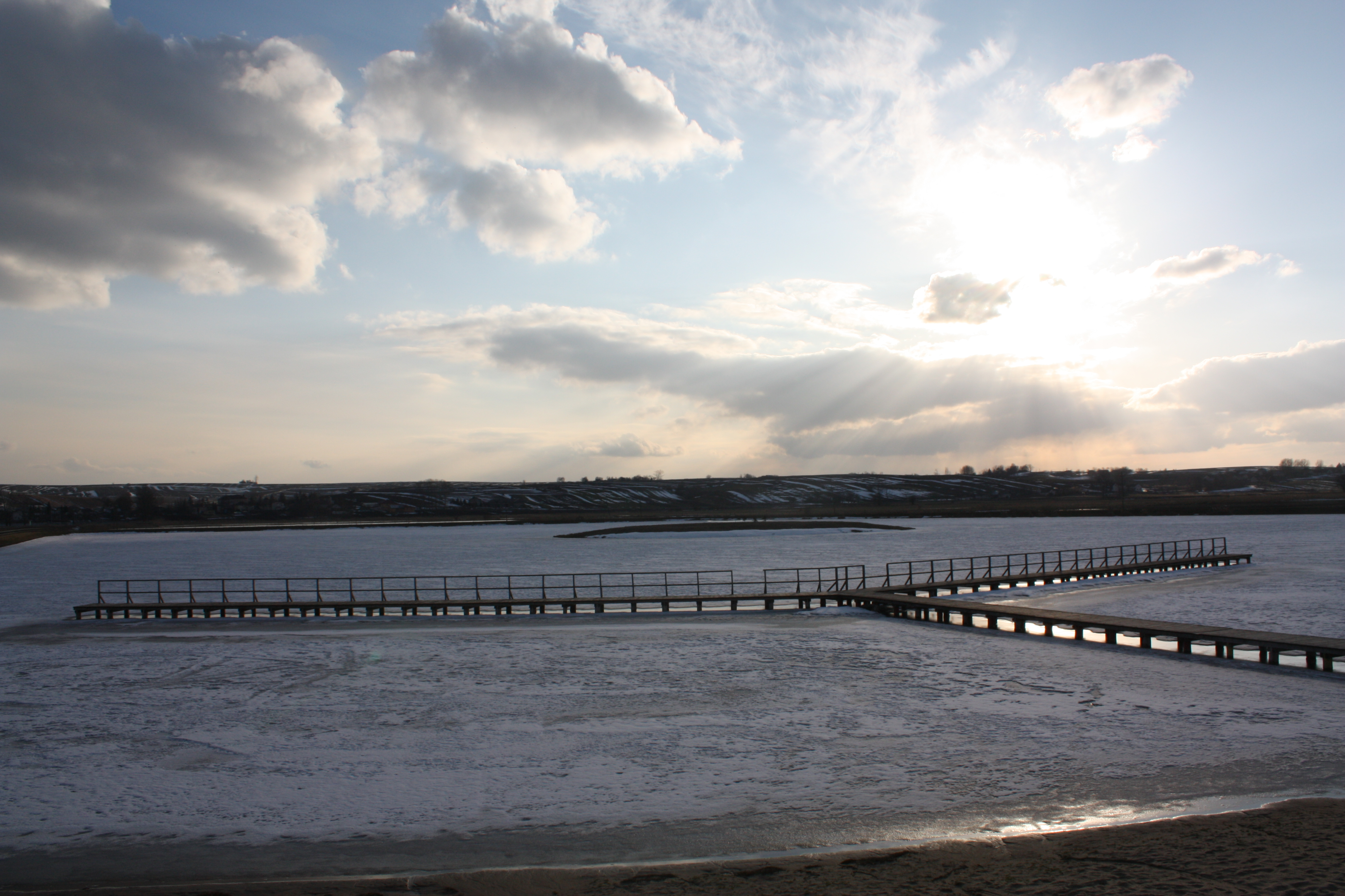 Zalew w Skalbmierzu zimą